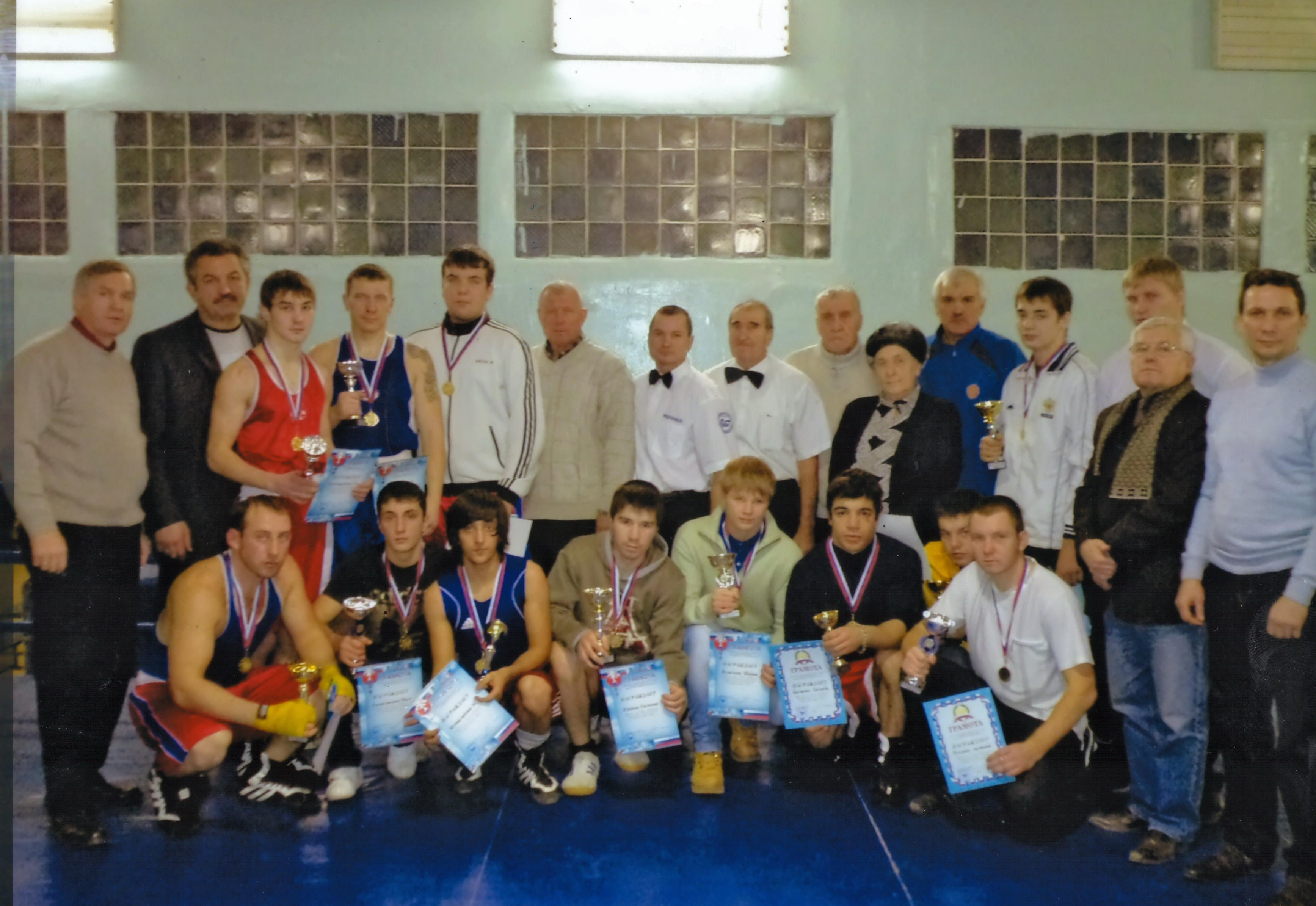 Награждение победителей Первенства Воронежской области посвященное ЗТ РСФСР Панькину В. К. Воронеж, зал бокса на центральном стадионе профсоюзов.